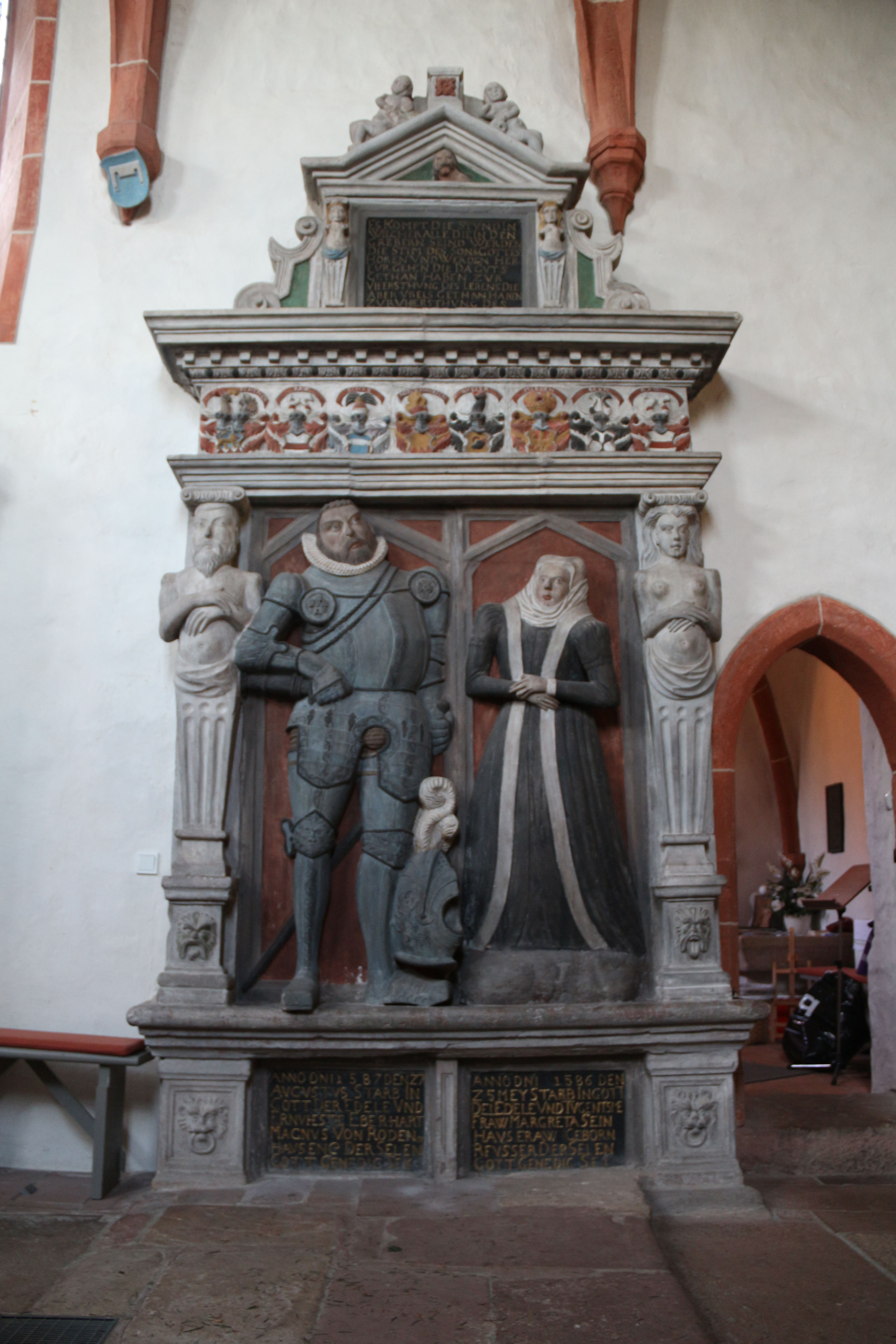 Evangelische Kirche Kirchberg (Lahn)